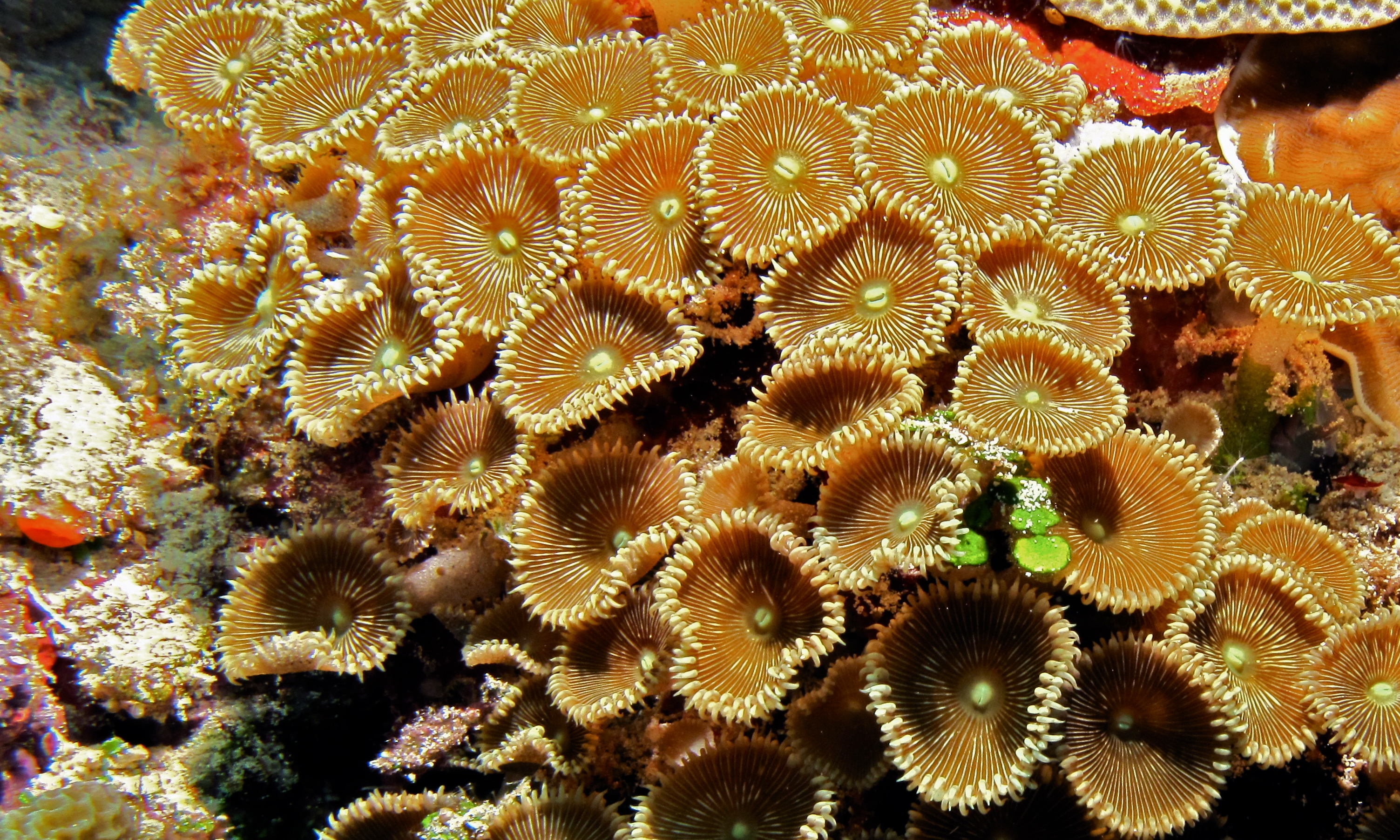 Timur I, Bunaken Island, Sulawesi, INDONESIA